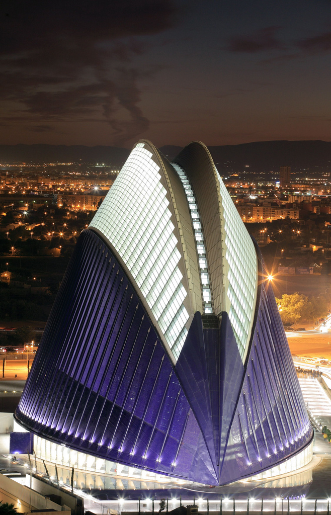 Ciudad de las Artes y las Ciencias. Valencia